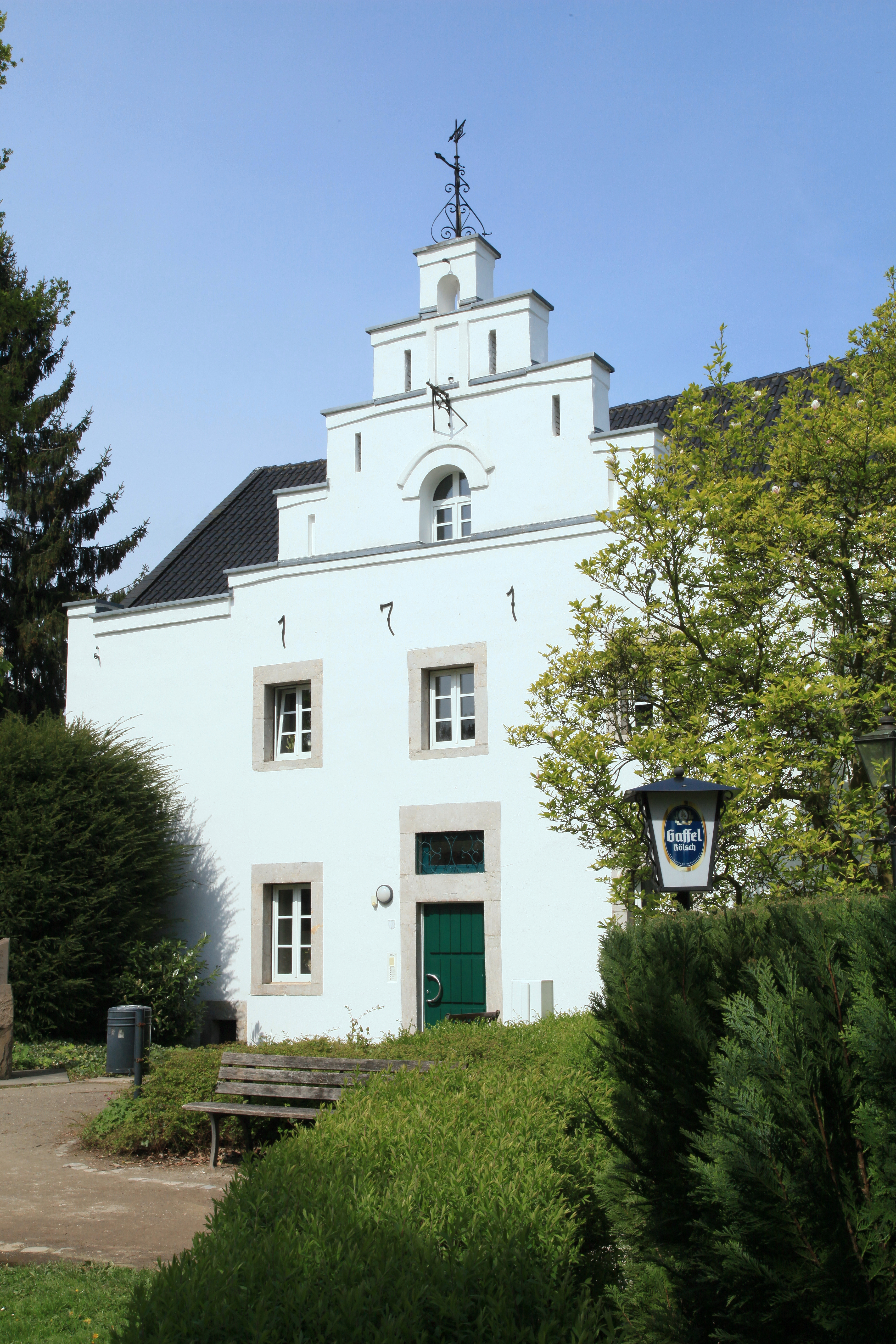 Haus Steinbreche, Dolmanstraße in Refrath, Bergisch Gladbach